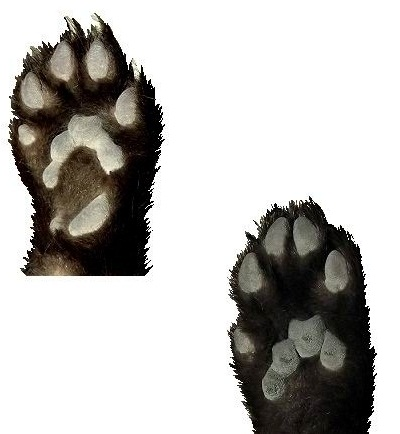 Extremidades delantera y trasera izquierdas de garduña (Martes foina)